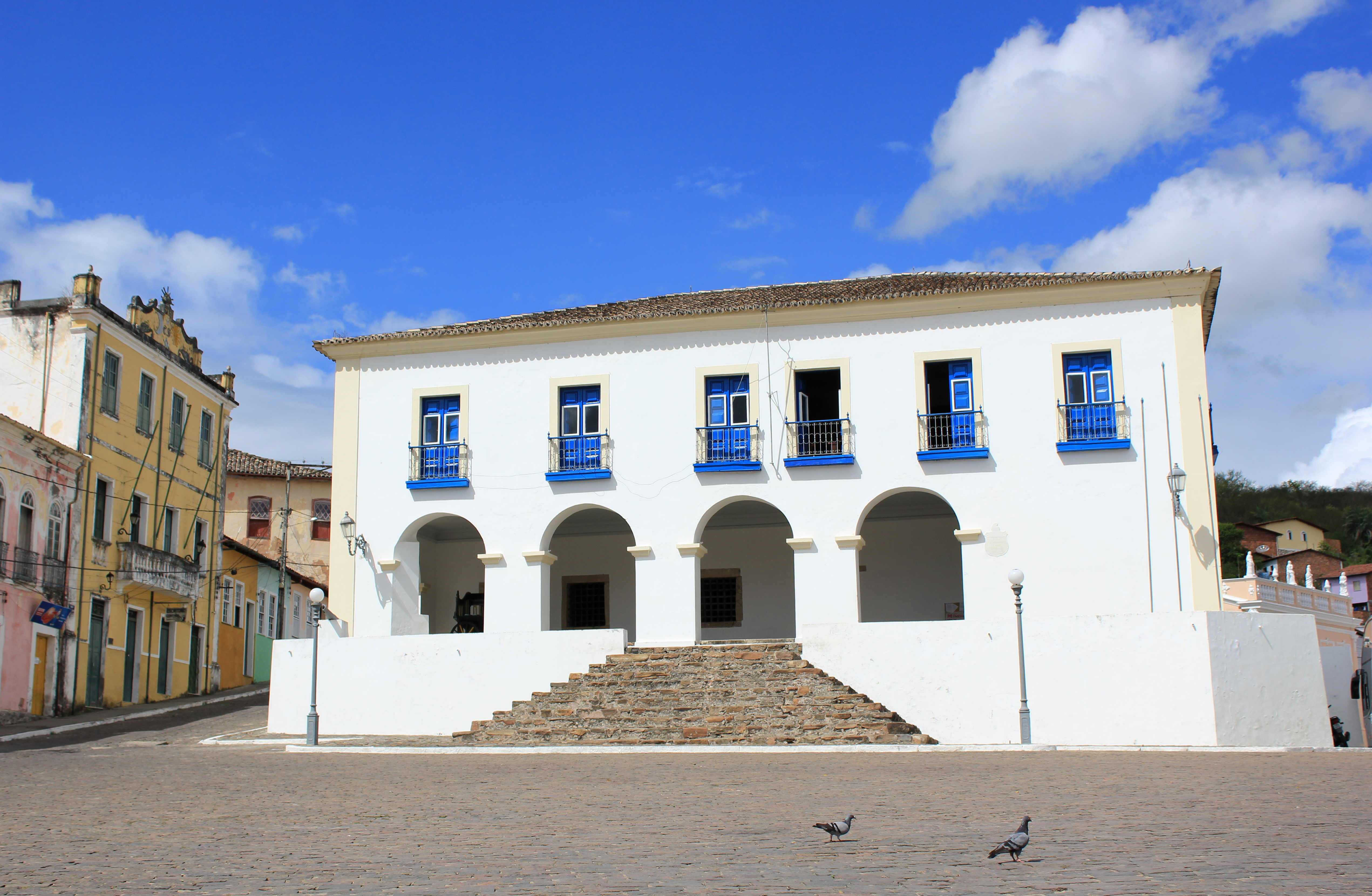 Câmara Municipal da Cachoeira -Ba Foto: Erica Almeida - Setur